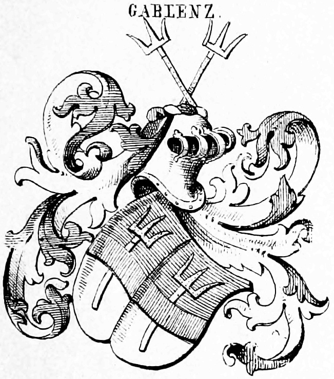 Wappen der von Gablenz (Niederlausitz)